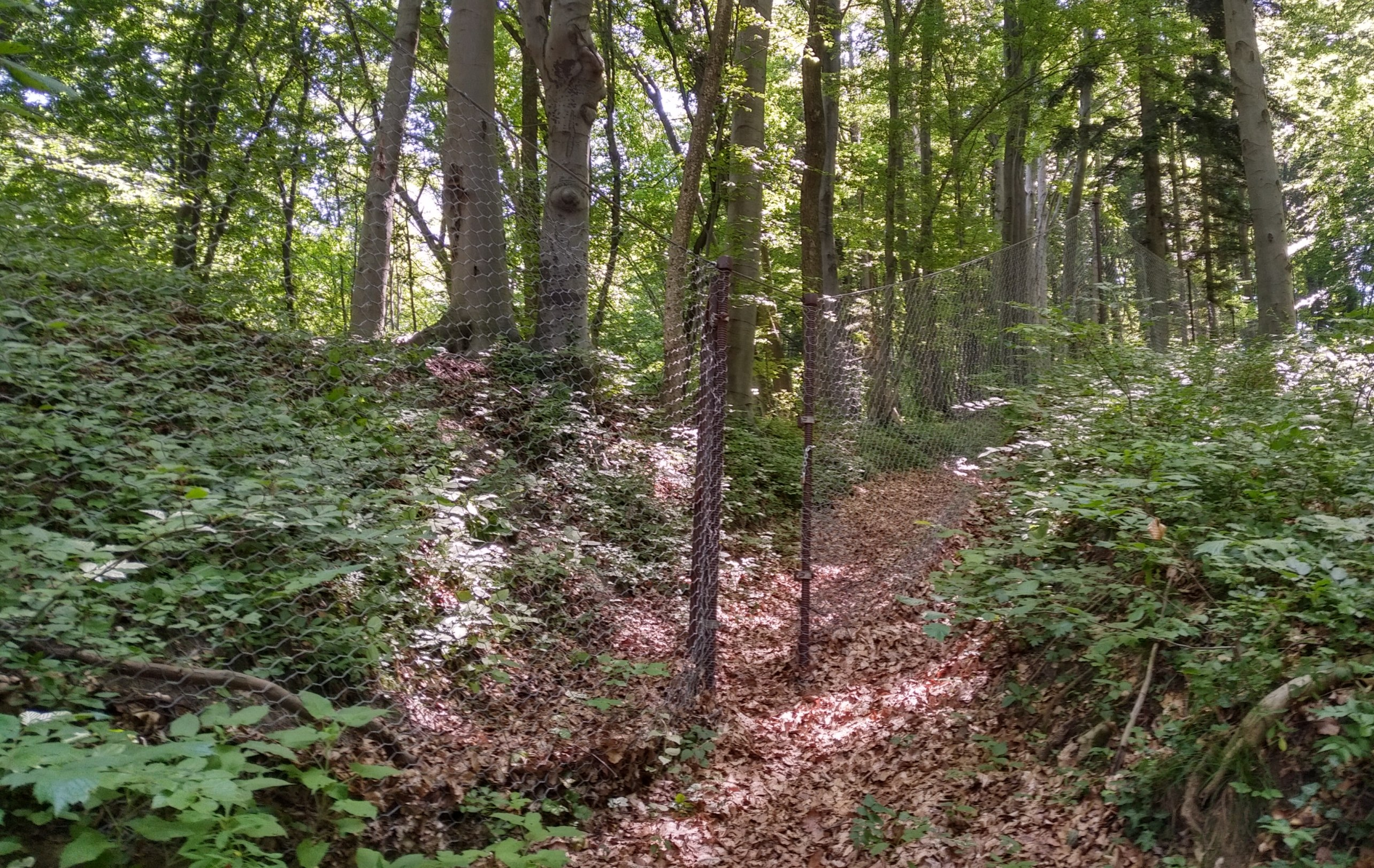 Ein im Zuge der Flüchtlingskrise 2015 von Österreich errichteter Grenzzaun an der Grenze zu Slowenien. Die Tore auf den Wanderwegen stehen offen.